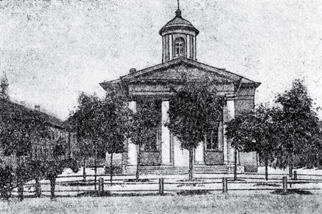 Кирха Святого Николая в Гатчине. Фотогравюра.